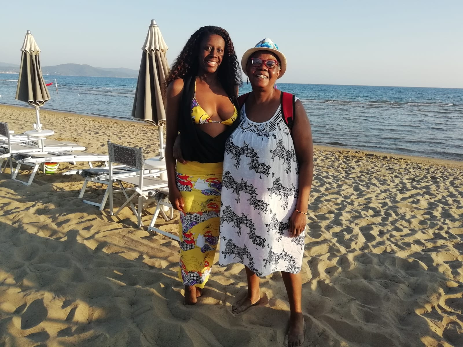 l'attrice italiana Sylvie Lubamba con la madre sulla spiaggia di Follonica